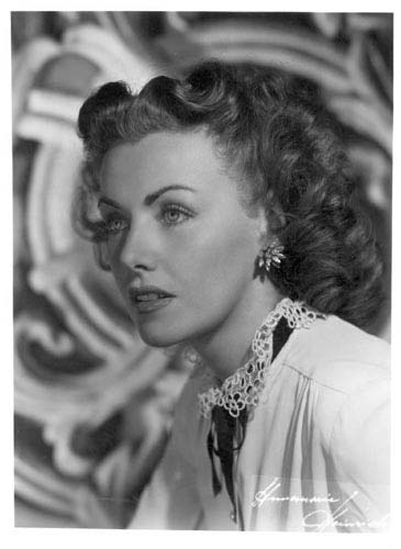 Alicia Barrié.